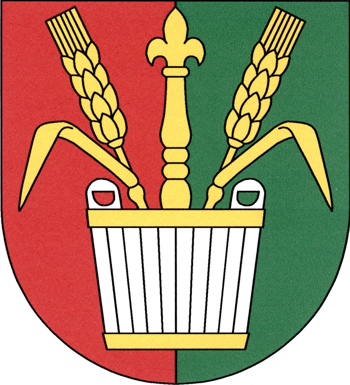 Znak obce Keblice